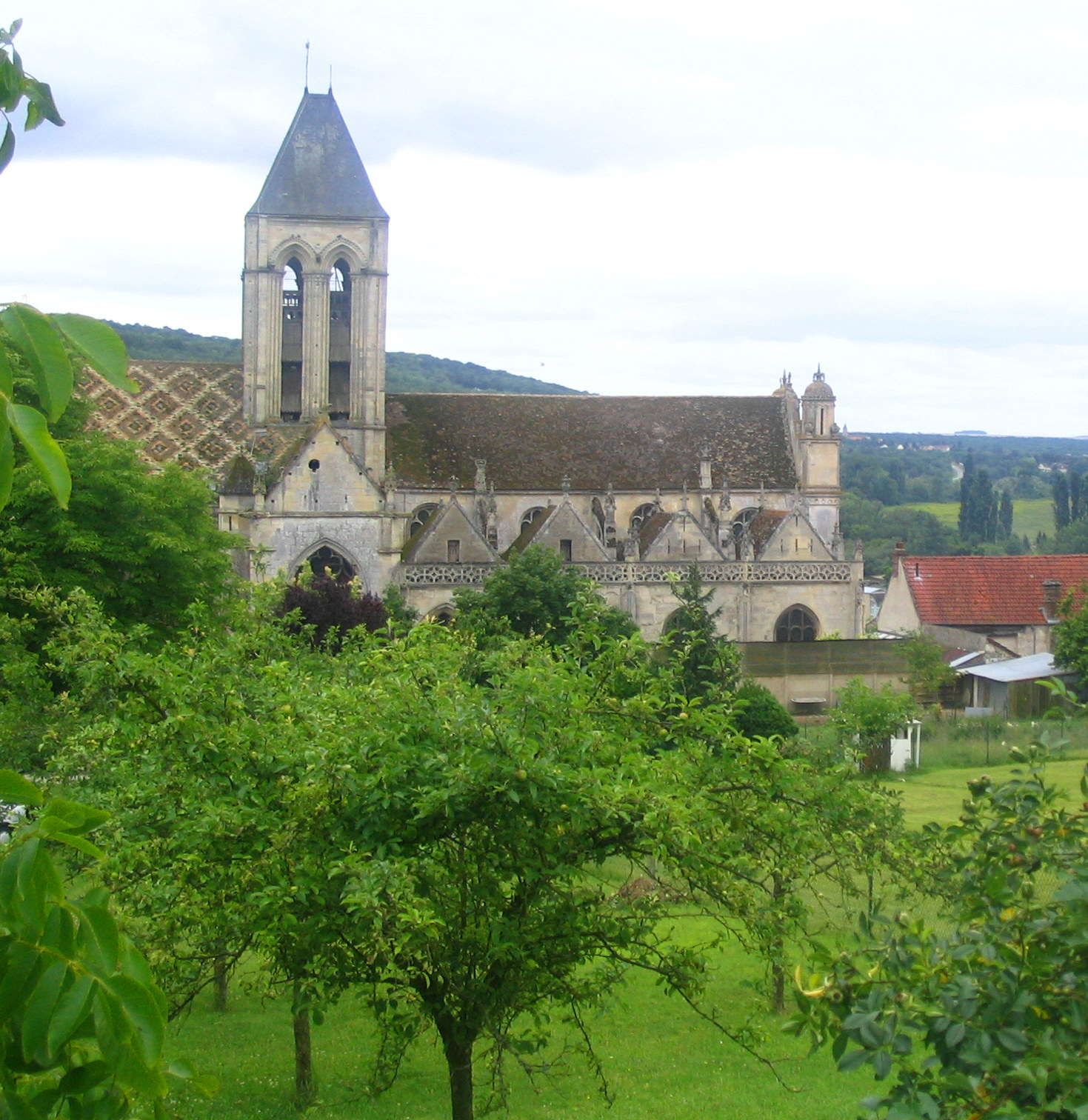 Eglise de Vetheuil, Val d'Oise, France